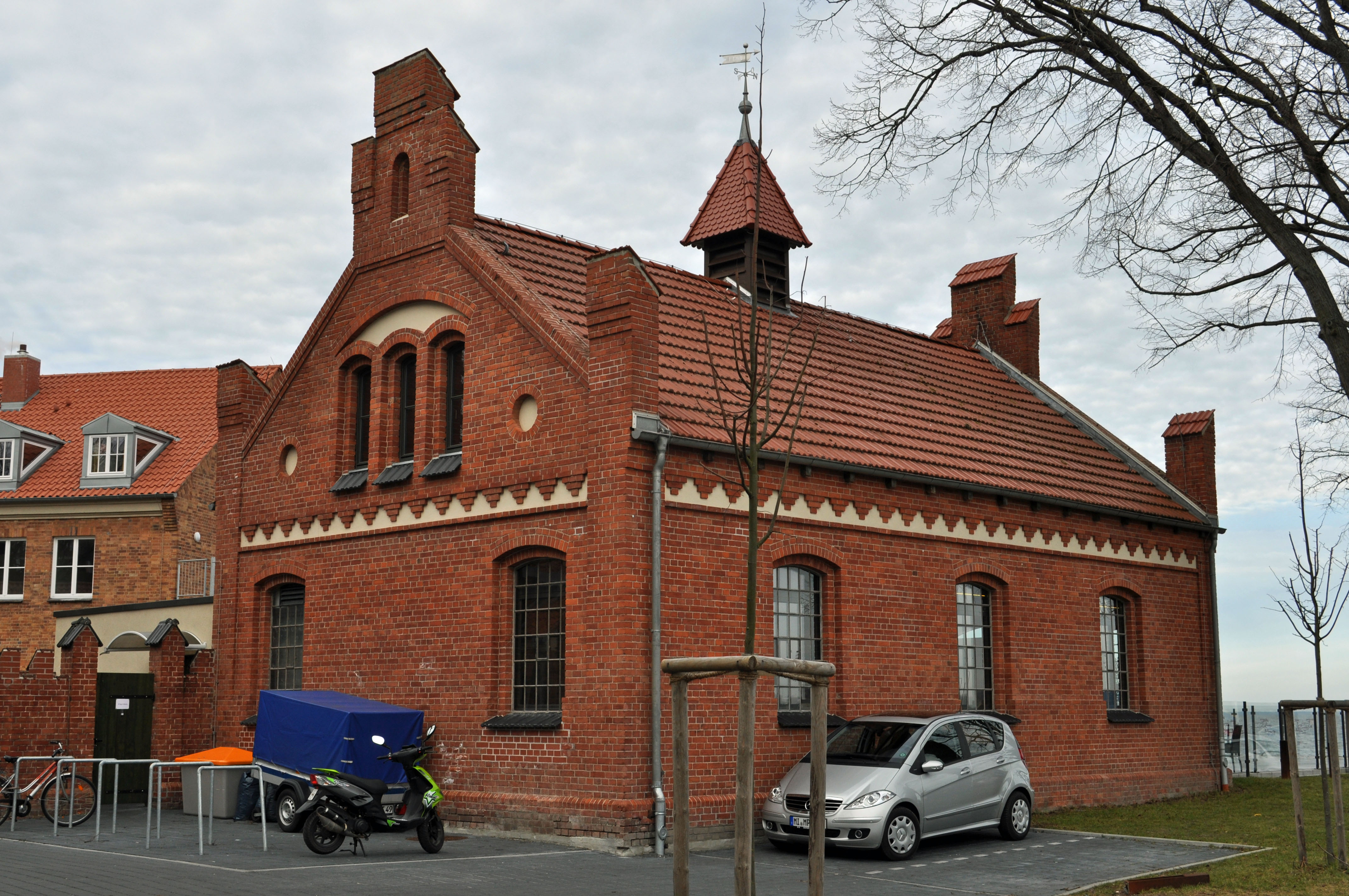 Gebäude bzw. Gebäudedetail in Stralsund. Straße und Hausnummer siehe Dateiname.